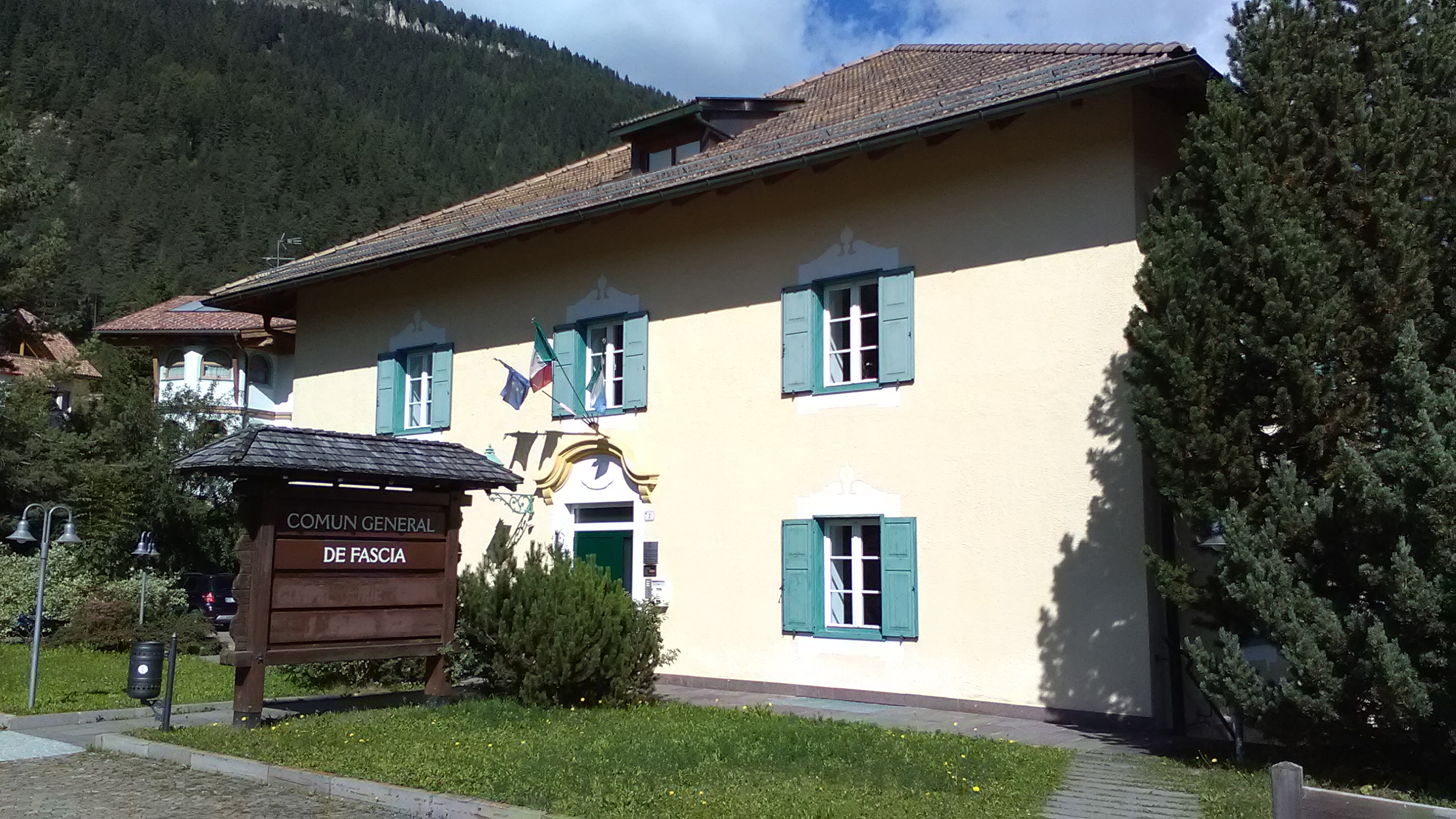 Sede del Comun General de Fascia (Comunità di valle della Val di Fassa) a Vigo di Fassa (Trento)